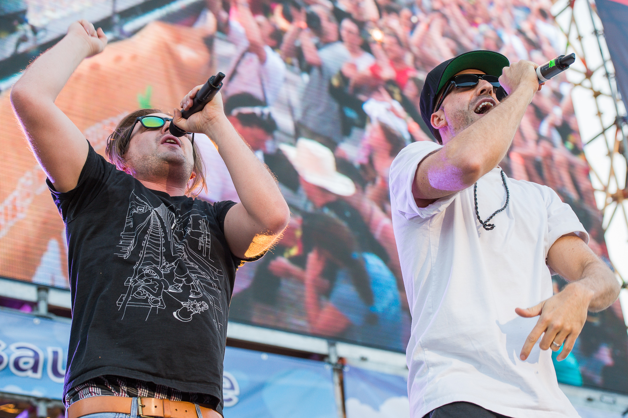 Die Atzen,Frauenarzt,Konzert,Livekonzert,Livemusik,Manny Marc,Marc Schneider,Musik,Radio N1,Super Sommer Sause 2016,Vicente de Teba,Werk B Events